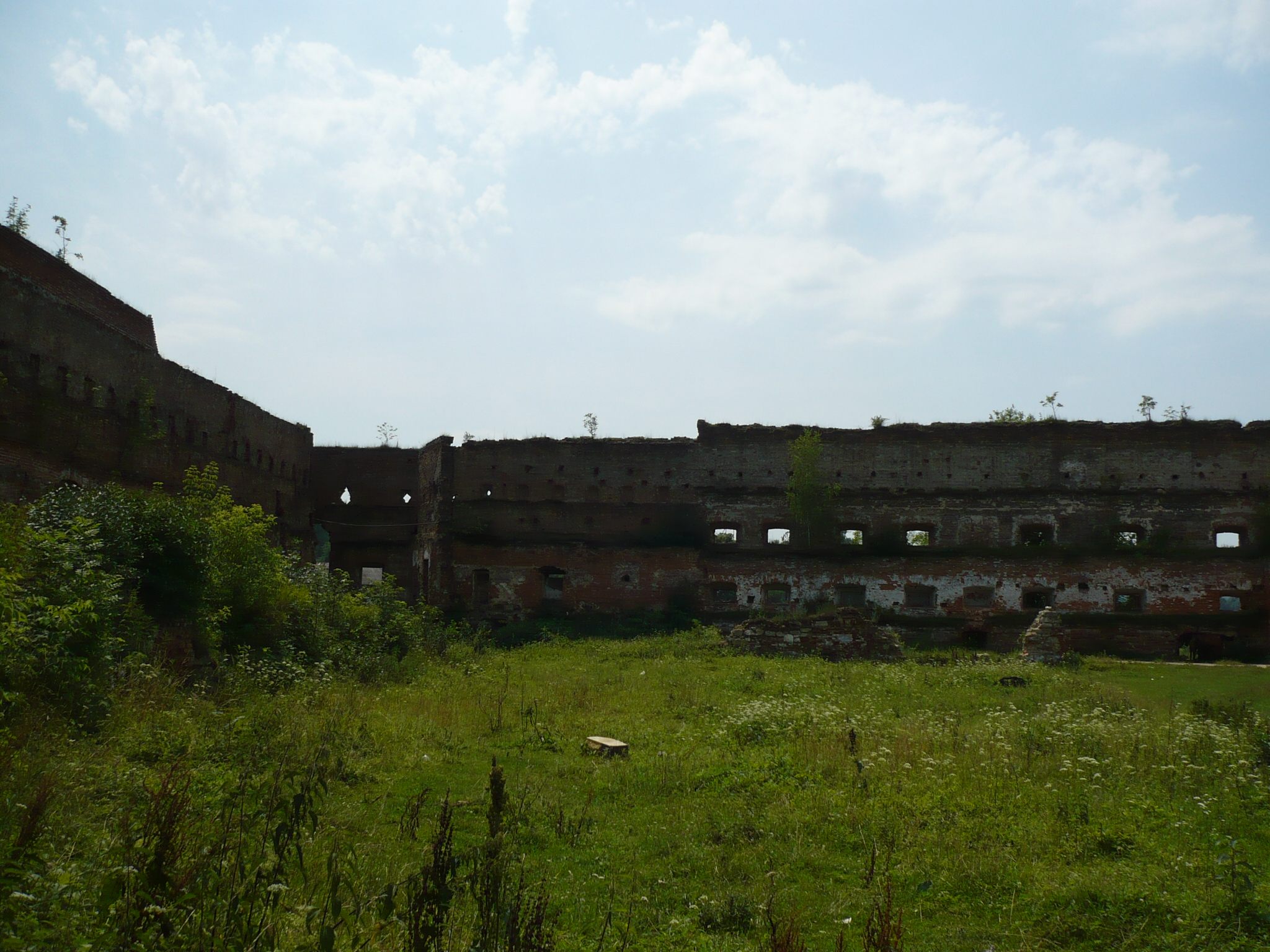 Starym Sioło - zamek księcia Zasławskiego, dziedziniec.